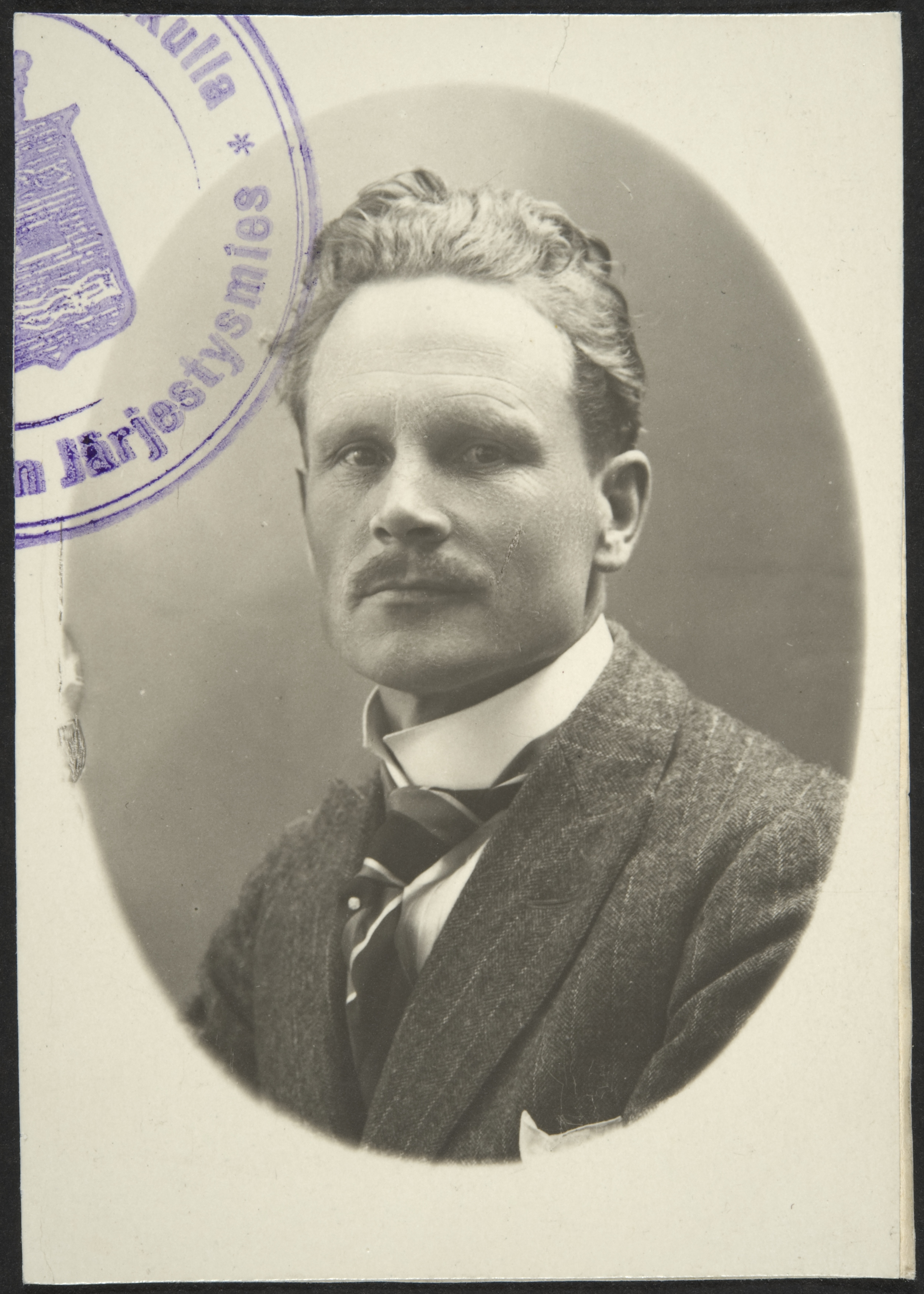 Alpo Sailo (vuoteen 1902 Albin Leopold Enlund)